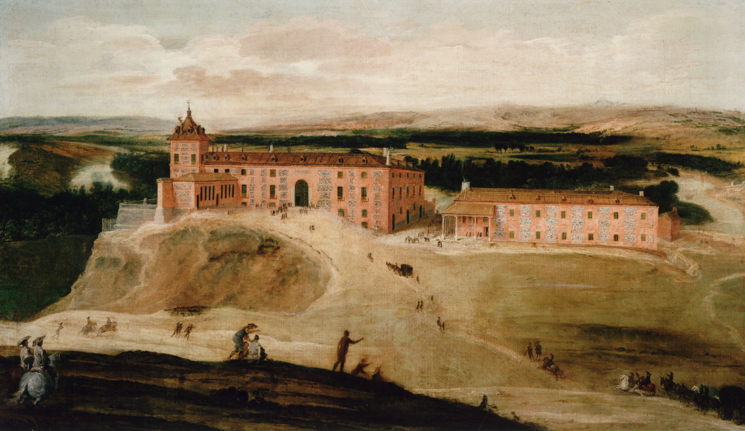 Vista de la Real Casa de Aceca (Siglo XVII)